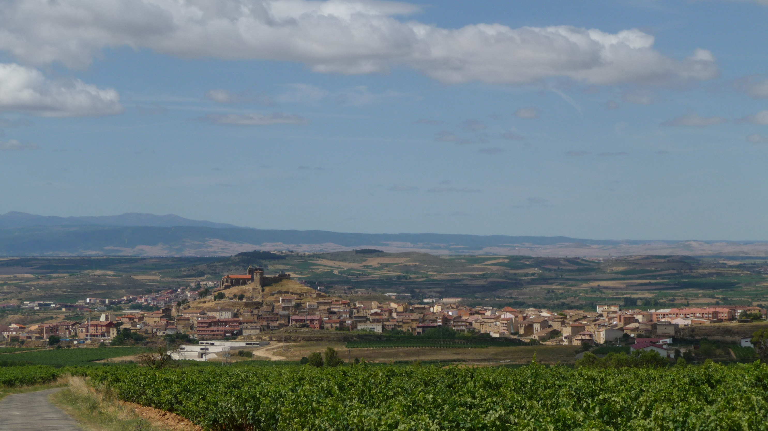 Vista de San Vicente de la Sonsierra, desde la carretera que sube a Peciña.